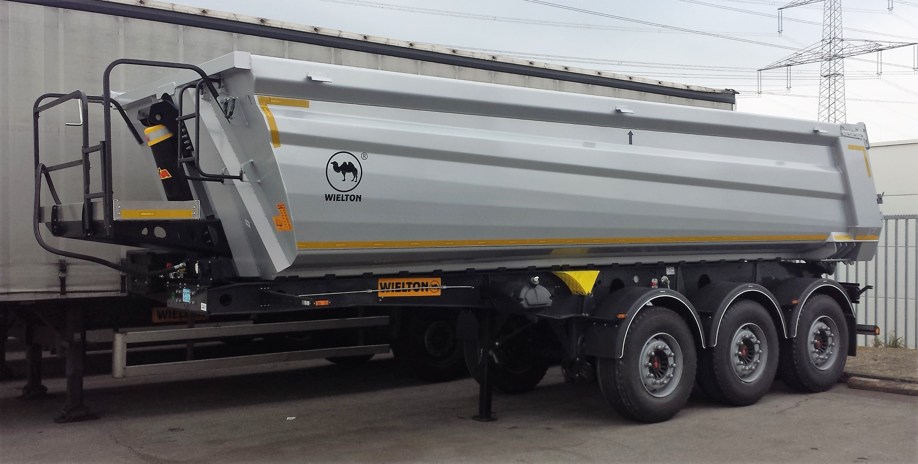 Fotografie eines Muldenkippers als mobiler Sattelauflieger in konischer Bauweise.